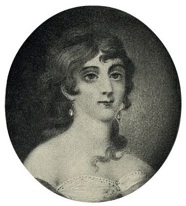 Княгиня Наталья Фёдоровна Голицына, ур. Шаховская (1779—1807)